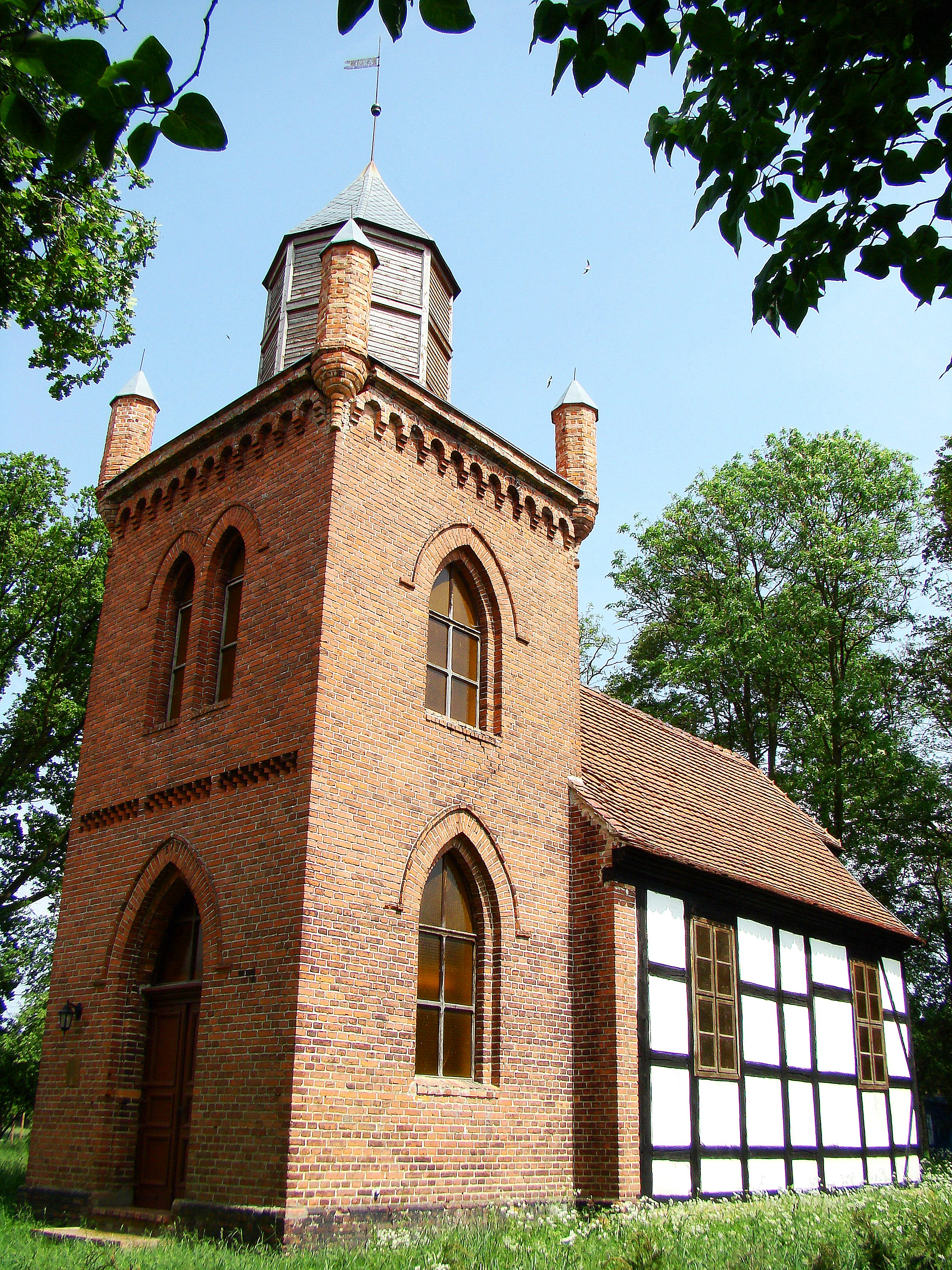 Kościół św. Huberta w Nowym Warpnie, Polska